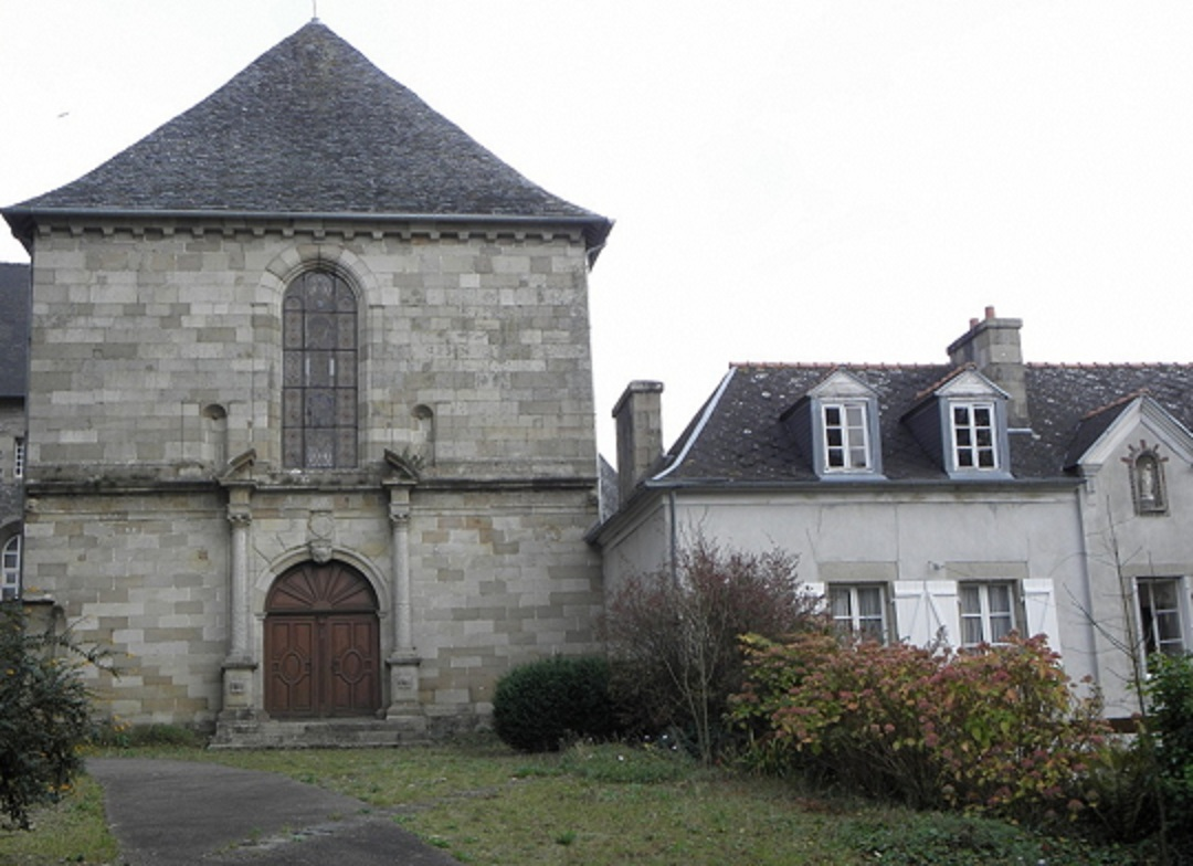 Façade occidentale de la chapelle des Ursulines de Morlaix (29).